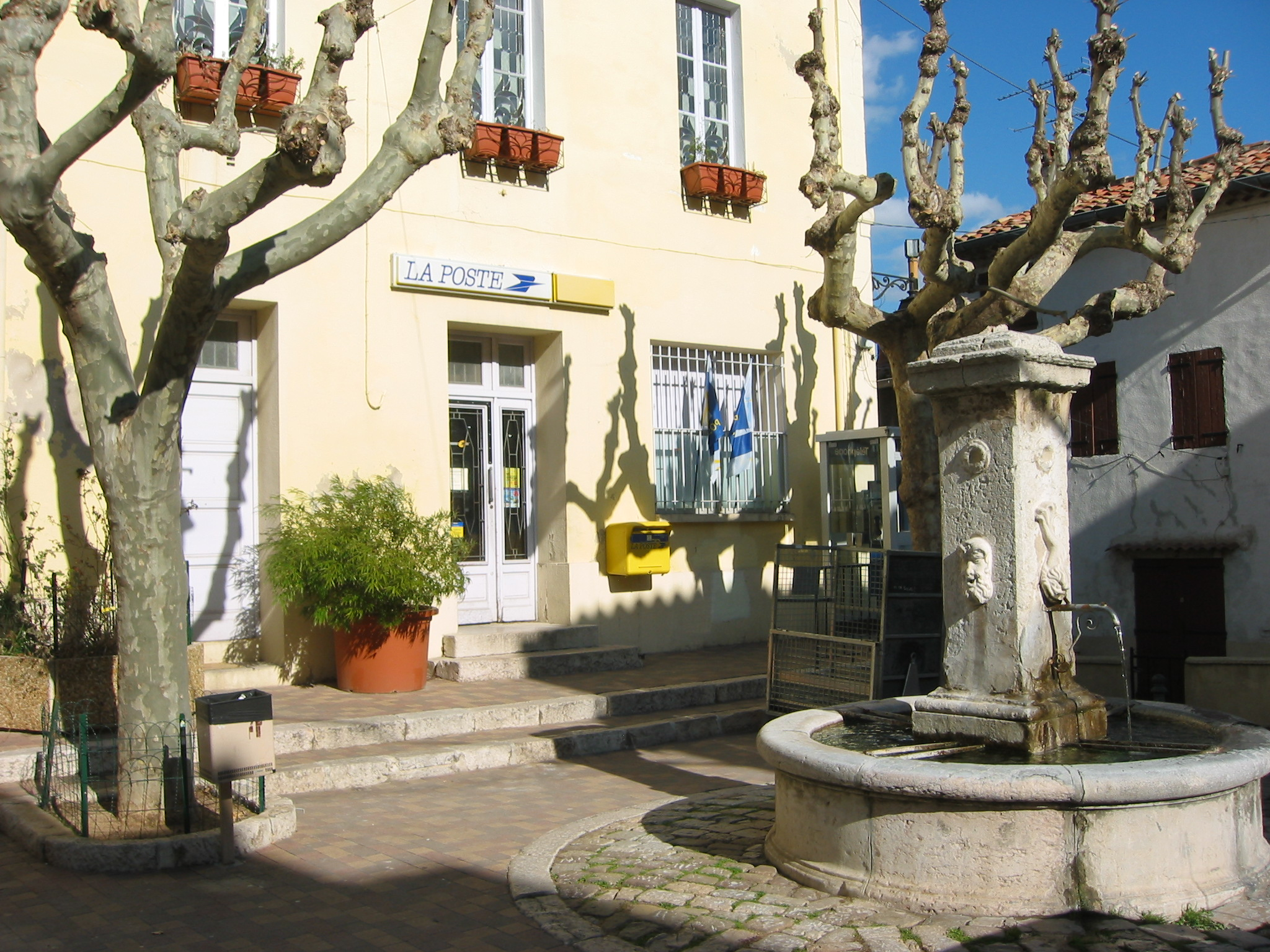 Place de la Servy, Poste de Saint-Savournin, Bouches-du-Rhône, France). Photo prise le 1er mars 2006. Auteur : Ludovic Ruat (utilisateur:civodule)